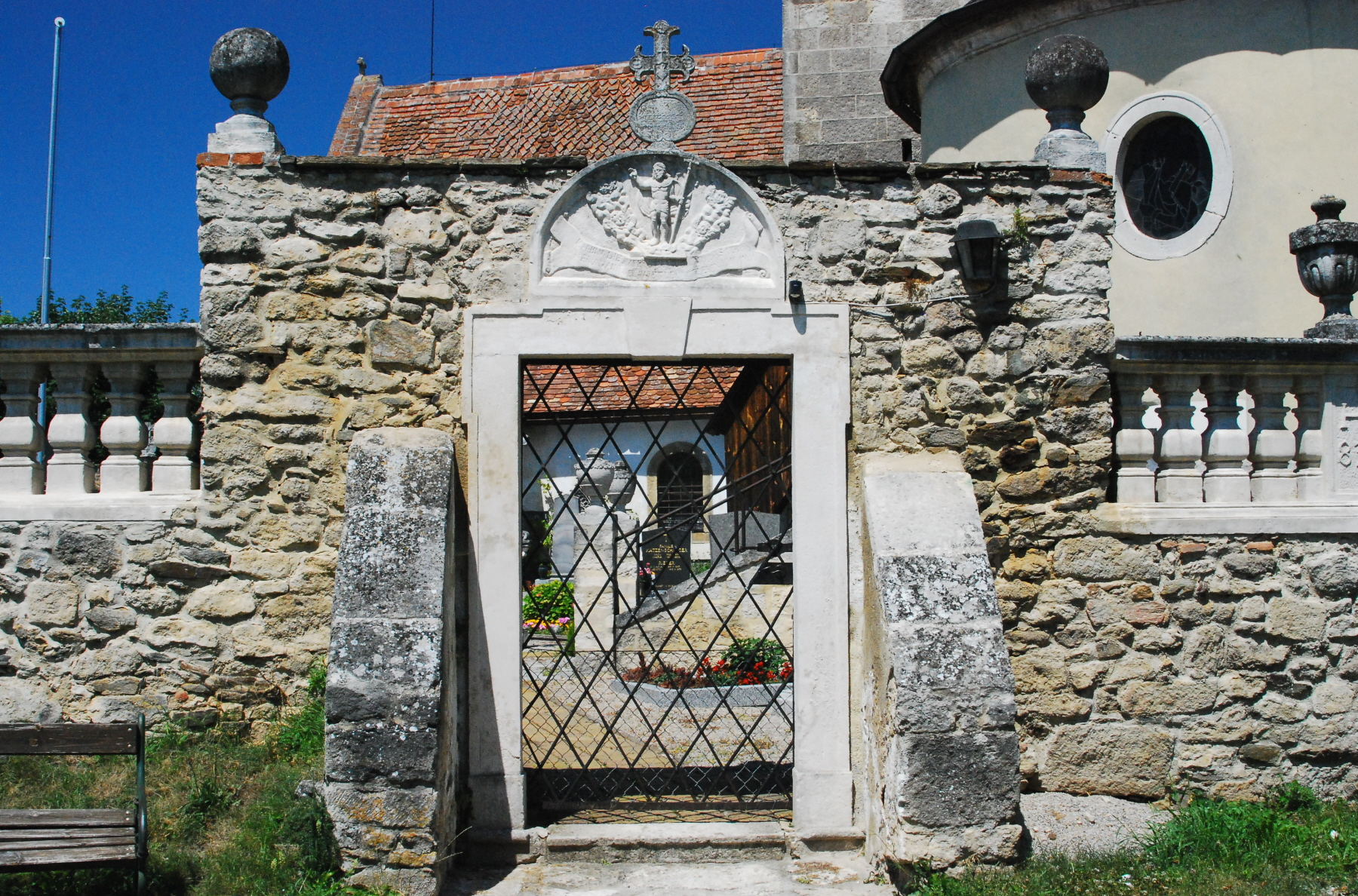 Portal des Friedhofs von Kühnring in Niederösterreich